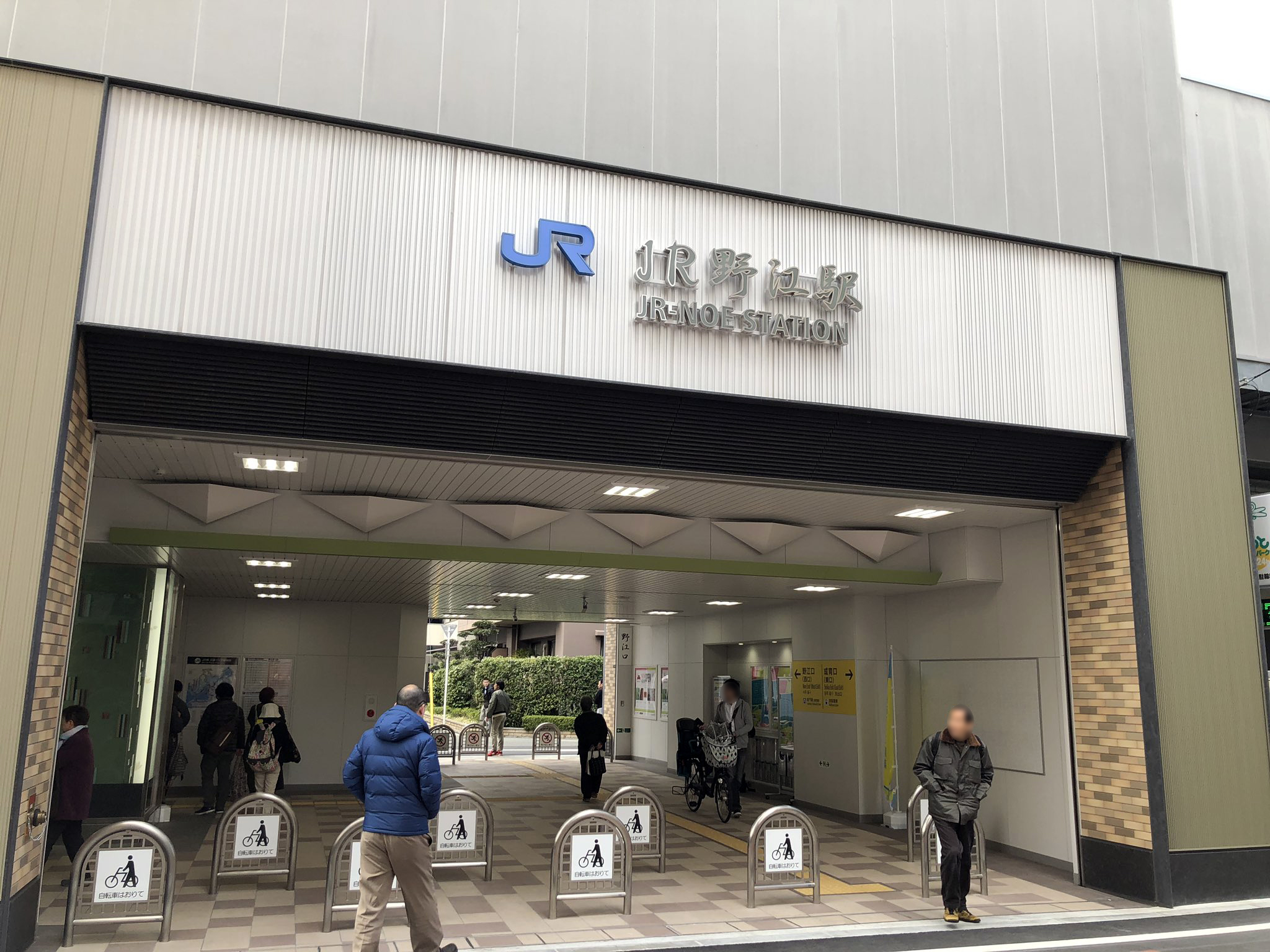 JR-Noe_Sta